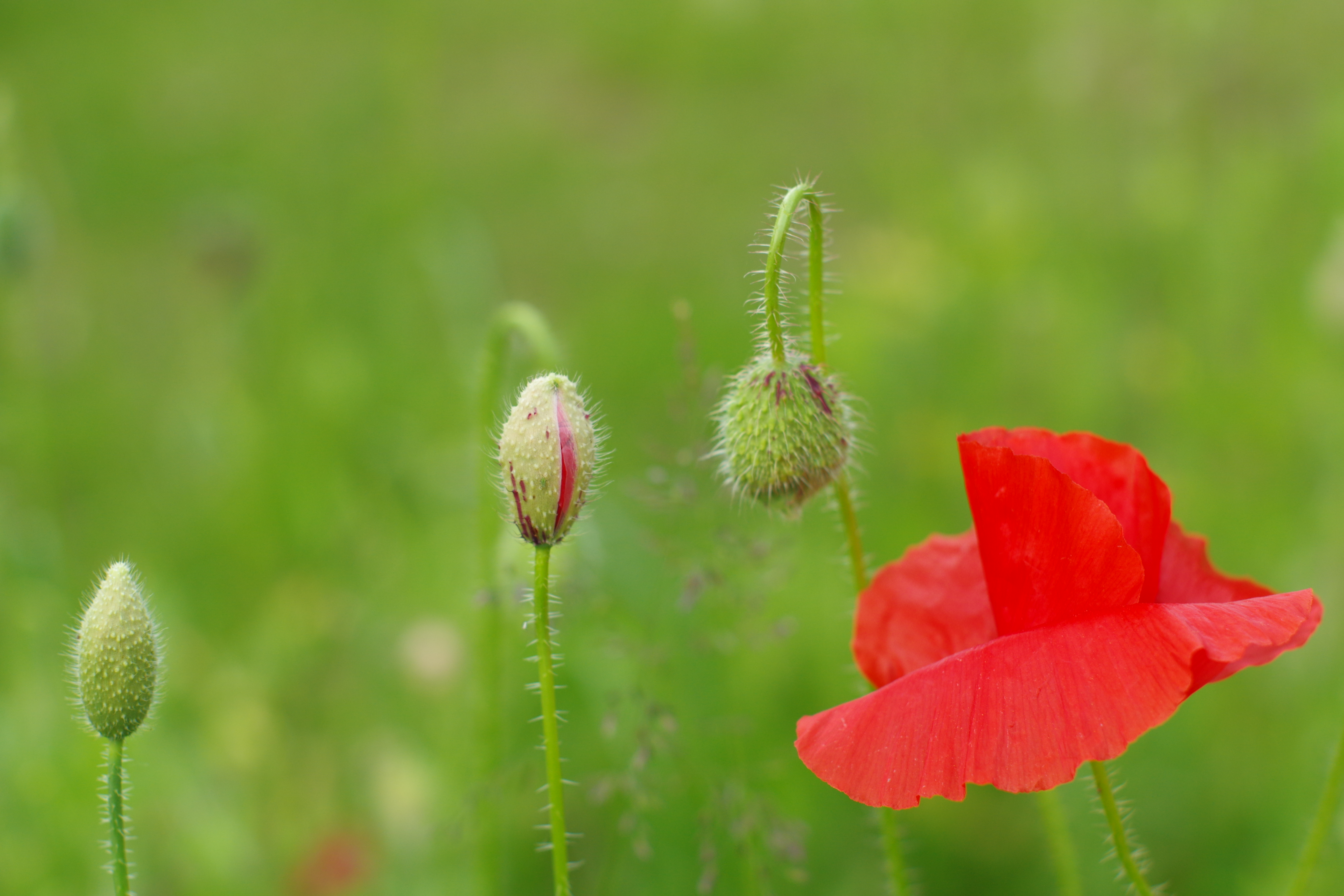 Différents stades de la croissance d'un coquelicot